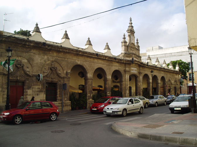 El Resbaladero, antigua lonja de El Puerto de Santa María, España. Edificio monumental del siglo XVIII.